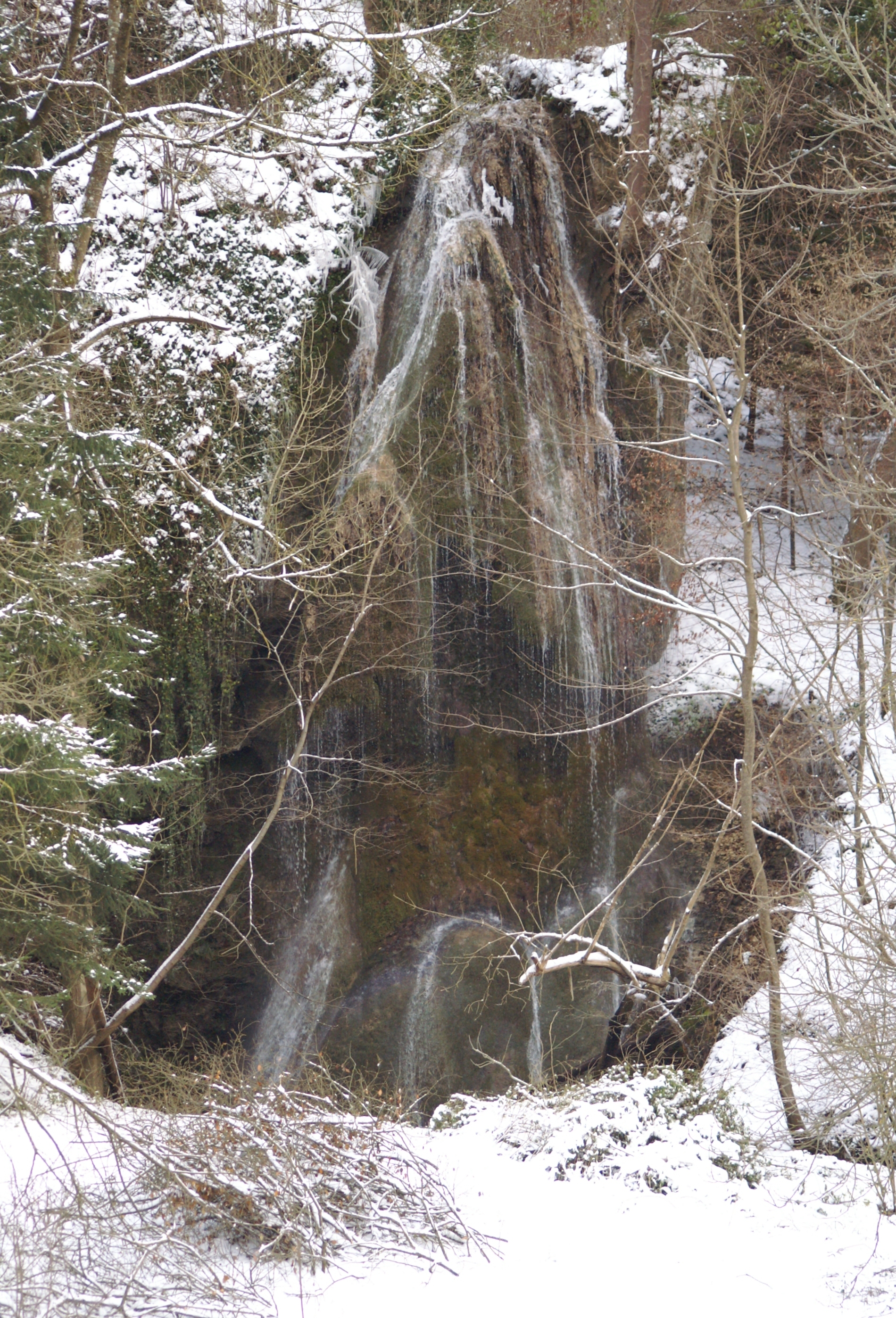 Kalksinterterrasse bei Unterdrackenstein am Talschluß der Gos.